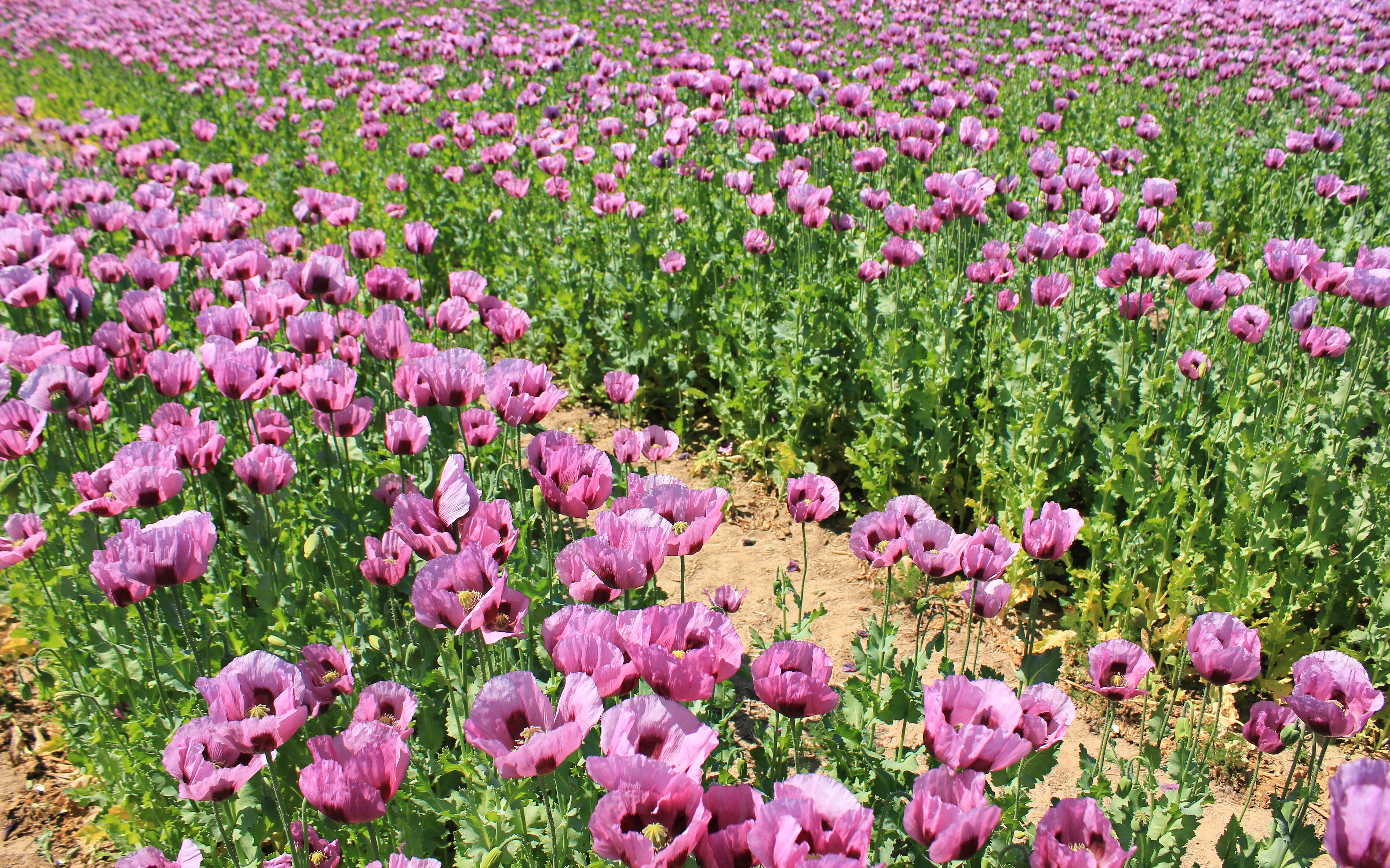 Blaumohn (Papaver somniferum). Sorte: ZENO MОRPHEX. Erzgebirgskreis, Sachsen.